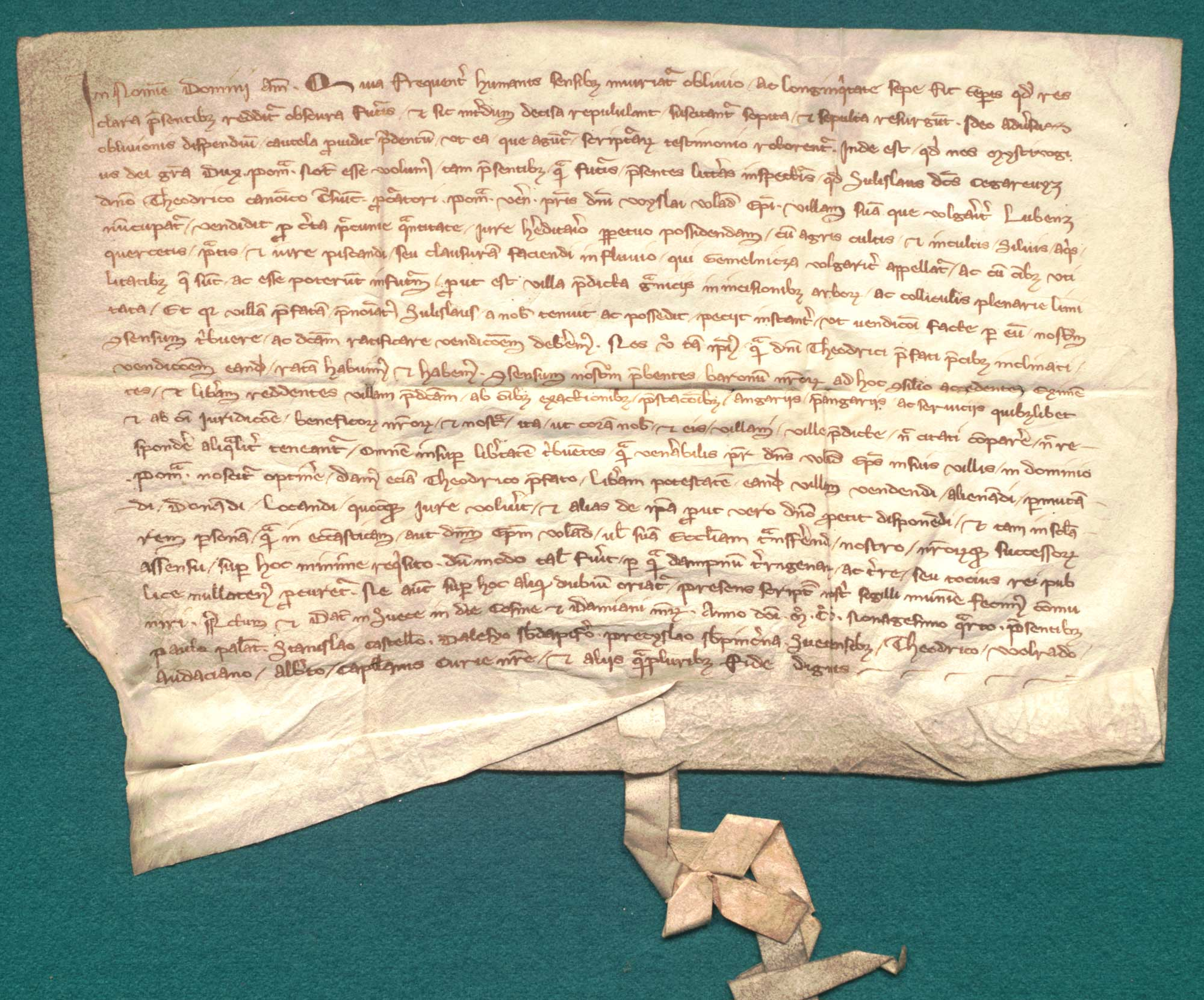 Mściwój, ks. pomorski, stwierdza, że Sulisław Cegarewyz sprzedał Teodorykowi, kanonikowi kruszwickiemu, wieś Lubenz [Lubcz]. Język: łac. Opis zewnętrzny: oryg., 1 k. pergaminowa, 29 x 18,5 + 2,5 cm; pasek od pieczęci